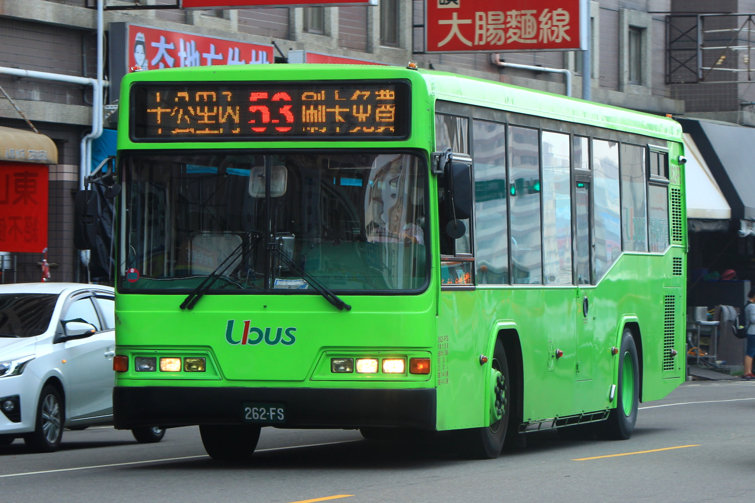 統聯客運2006年日野ERK2JMU大客車262-FS。